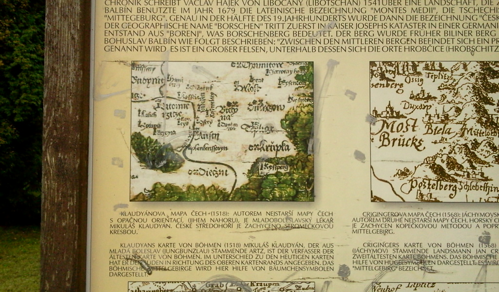 Bílina, Czech Republic